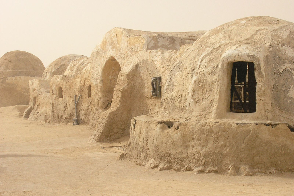 StarWars village, Sahara, Tunisia